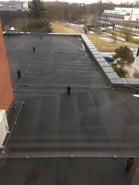 Maaülikooli tehnikamaja katusekate pildistatud neljandalt korruselt.